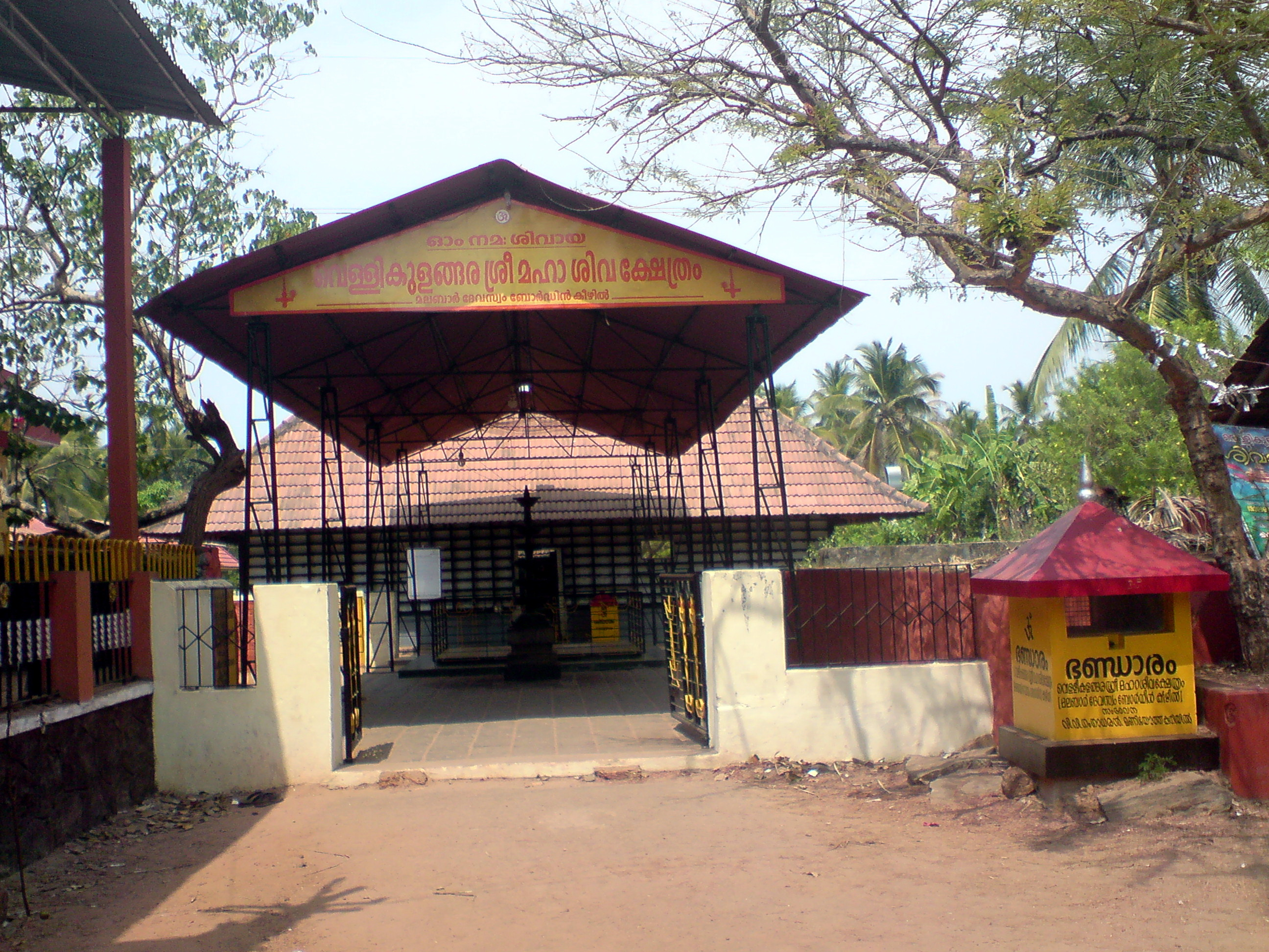 Vellikkulangara Sree Maha Shiva temple, Vellikkulangara, Vadakara